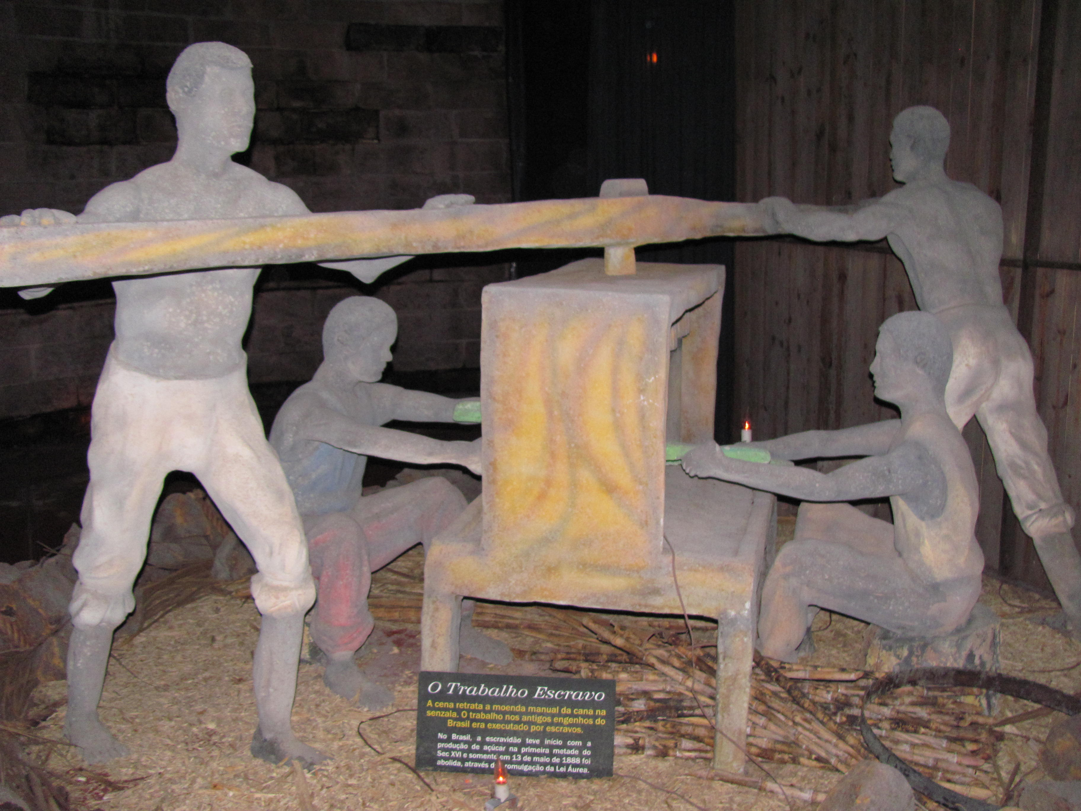 Museu da Cachaça no Parque da Guarda em Santo Antônio da Patrulha